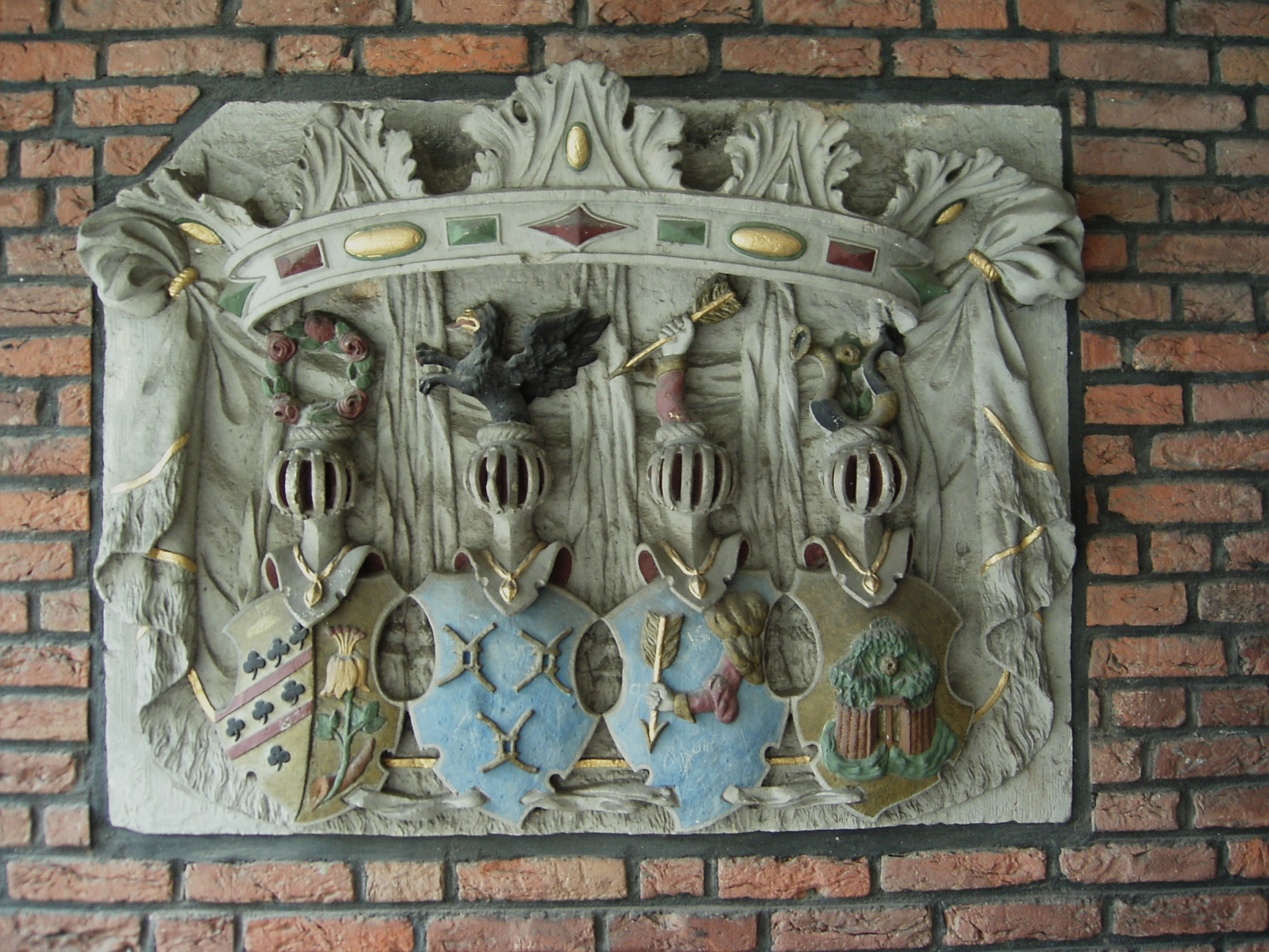 Wappenstein von 1700 an der St.-Michaelis-Kirche in Bremen, Doventorsteinweg 51, mit den Wappen der Bremer Bürgermeister Melchior Schweling, Friedrich Casimir Tilemann, Heinrich von Aschen und Hermann Doverhagen.Das abgebildete Objekt ist ein geschütztes Kulturdenkmal in der Freien Hansestadt Bremen, mit der Nr. 0323 beim Landesamt für Denkmalpflege registriert.